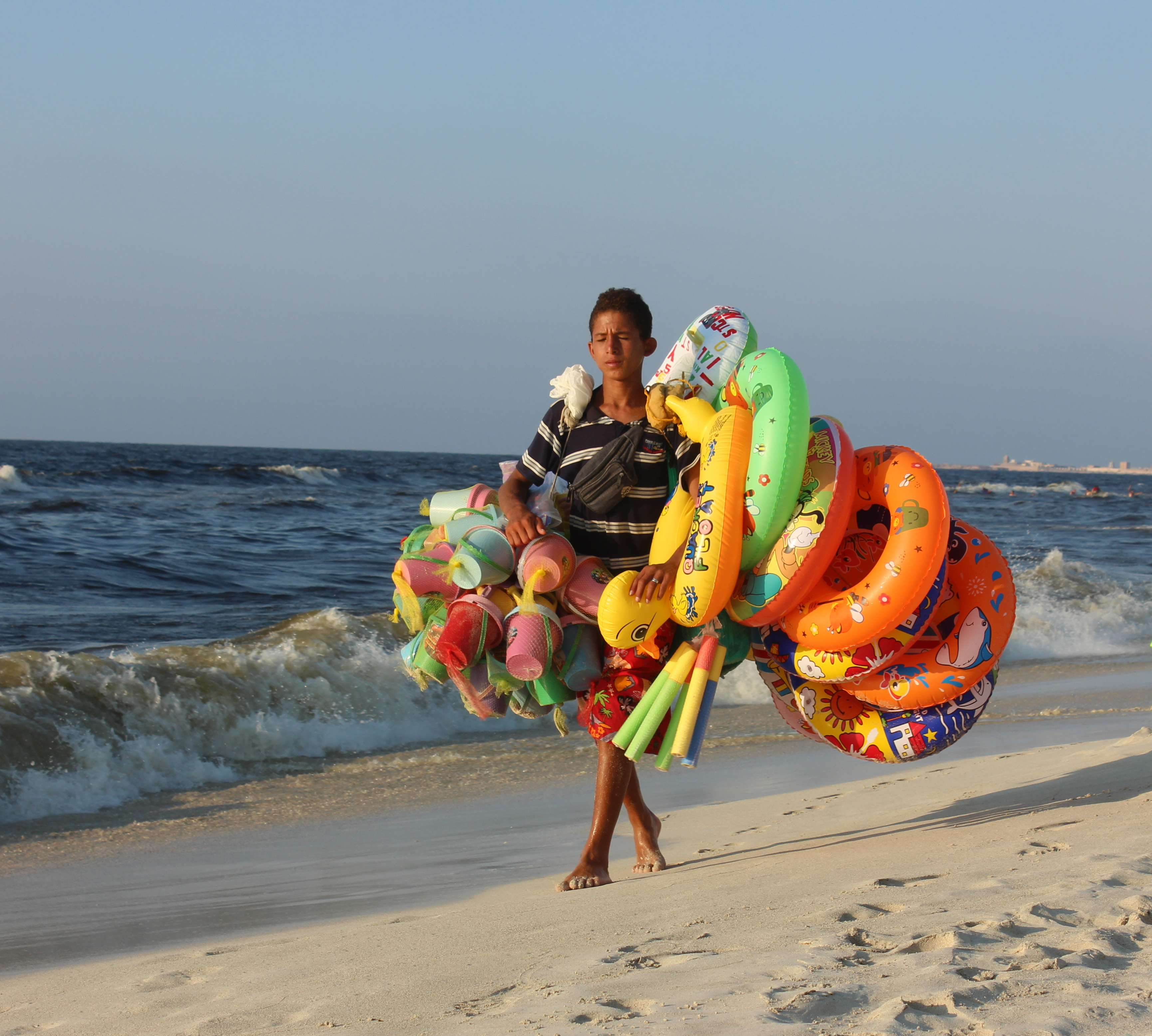 بائع الأطواق الهوائية في شاطئ الإسكندرية.